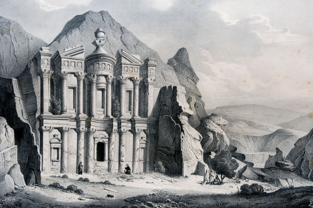 Le Deir. Lithographie extraite du livre de Léon de Laborde Voyage de l'Arabie Pétrée (1830)